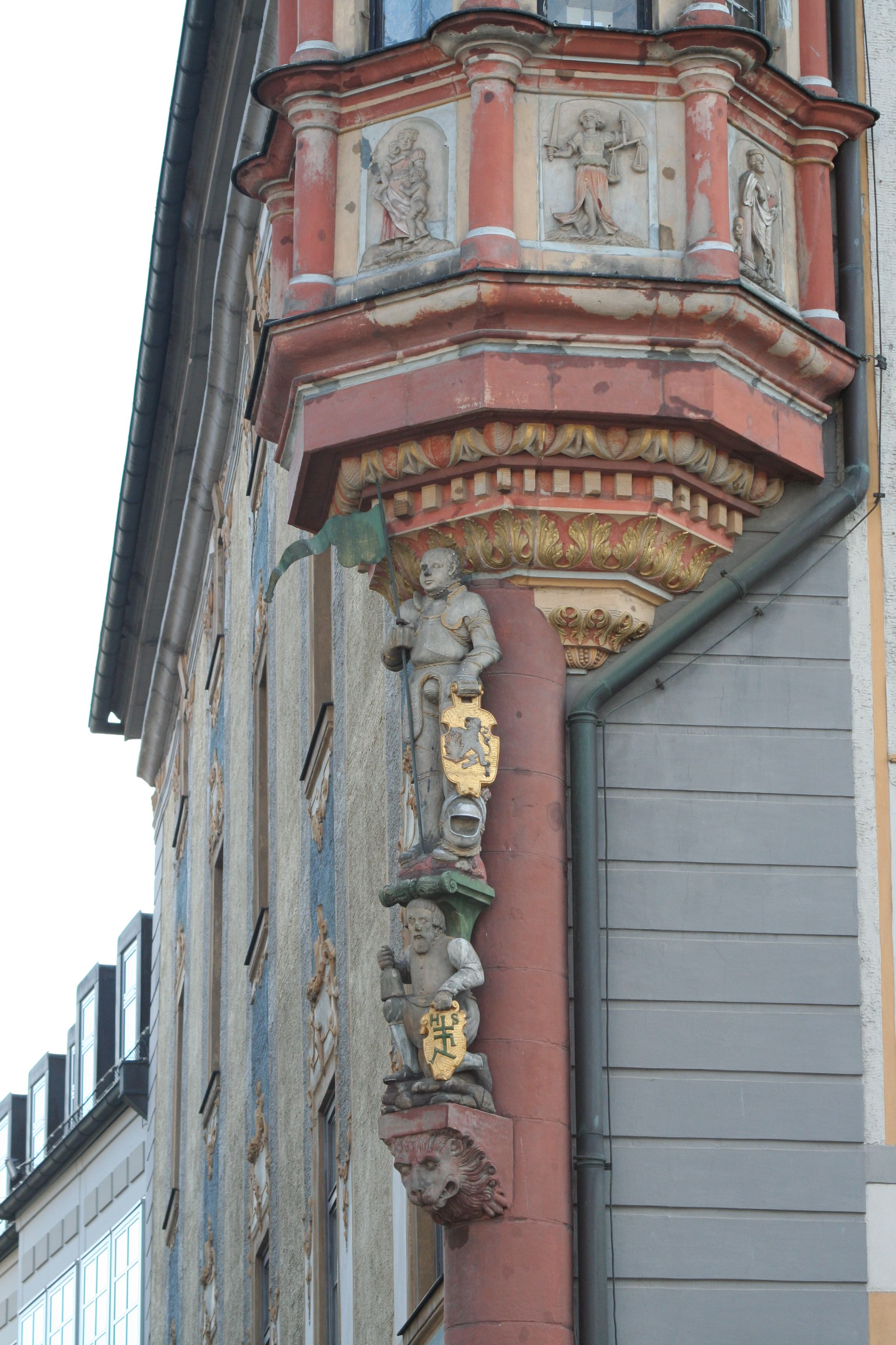 Rathaus, am Markt 1 in Coburg; Erker